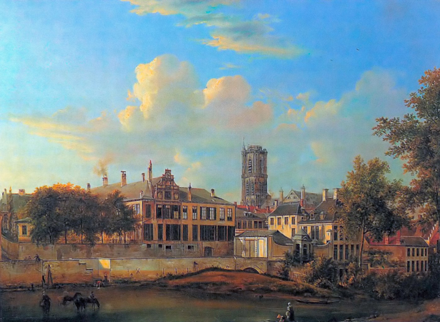 Het bisschoppelijk paleis in 1819, het voormalige Hof van Sint-Baafs - Gent - Oost-Vlaanderen - België